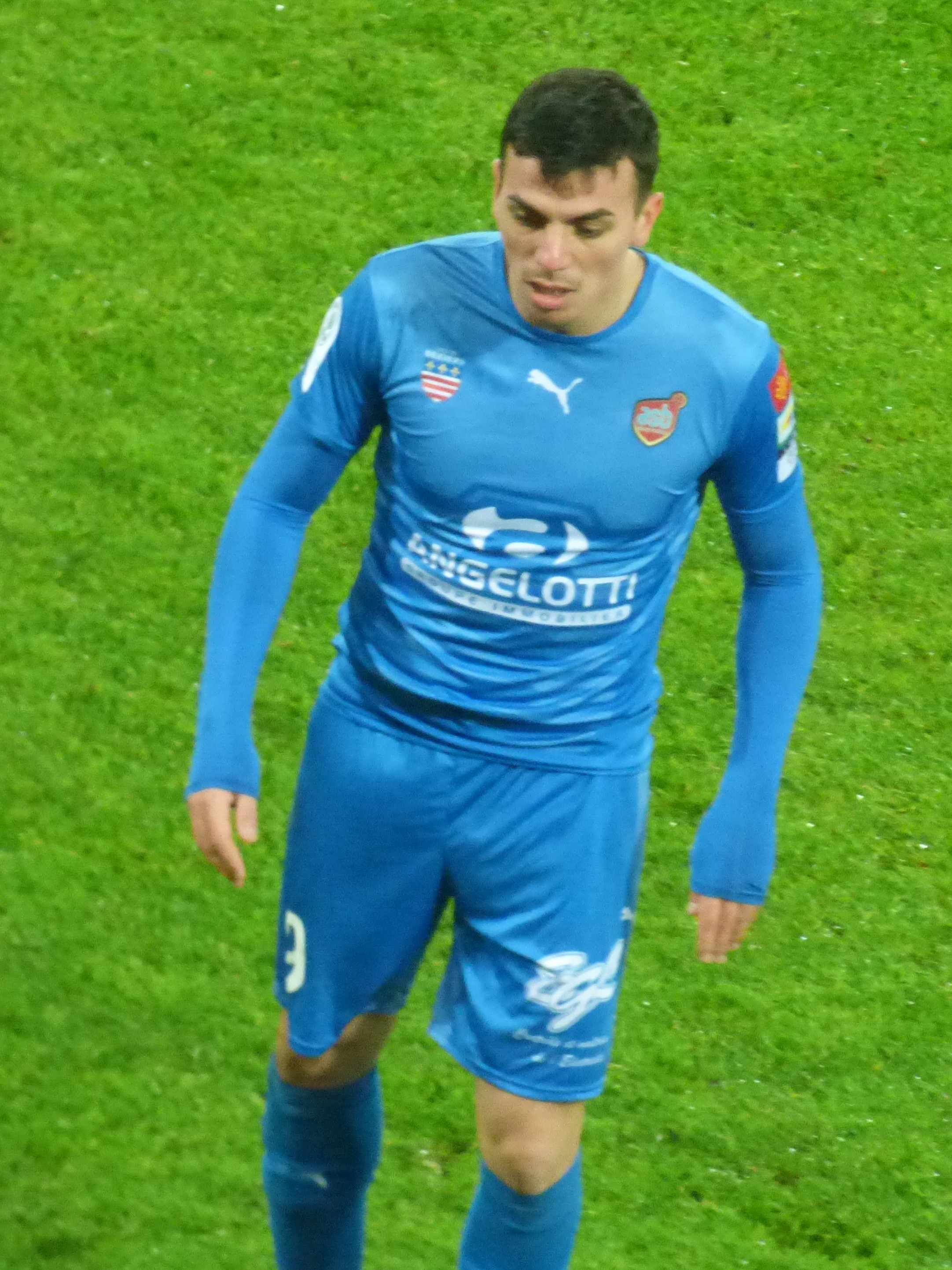 Antoine Rabillard pendant le match RC Lens / AS Béziers, comptant pour la 23ème journée du championnat de France de football de Ligue 2 2018-2019, le 4 février 2019, au Stade Bollaert-Delelis.